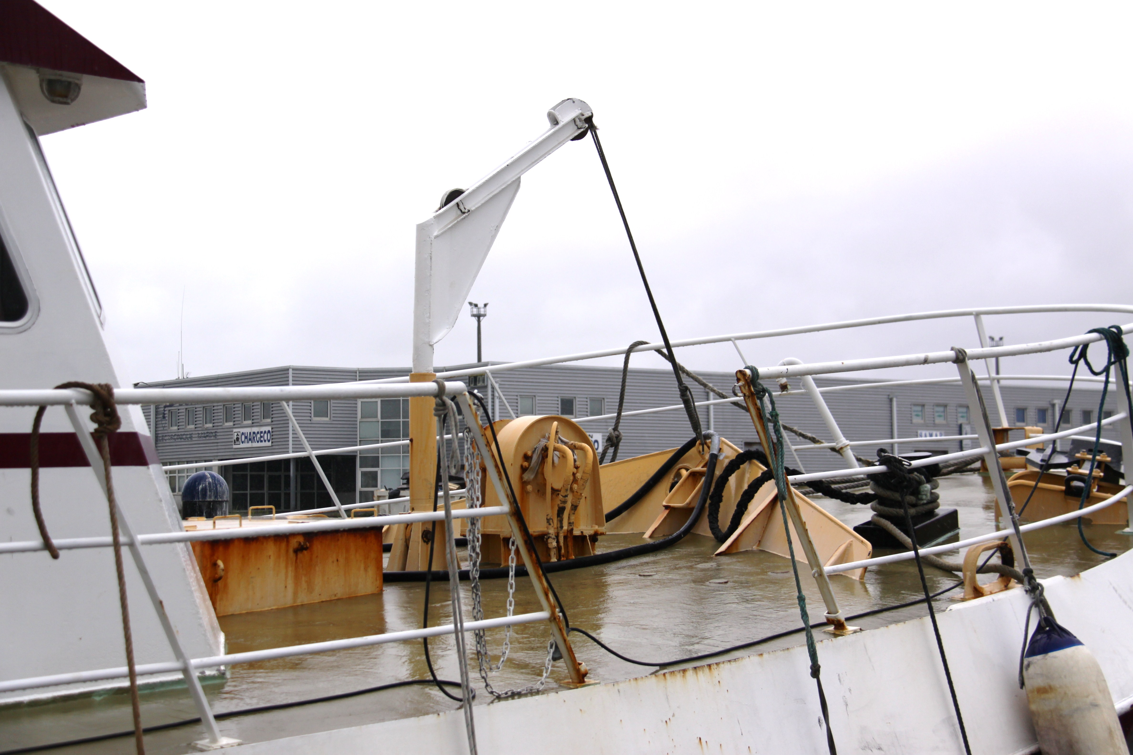 Le gaillard avant (avec son brise-lames et une potence) du chalutier "Paphido II" amarré dans le port de pêche de Chef de Baie. Ce bateau de pêche (chalutier hauturier) a été construit en 1989. Il mesure 18 mètres de long et la puisssance de sa machine est de 323 kw. Sa coque est en métal. Immatriculation: LR 726712. La Rochelle, Charente Maritime, France.